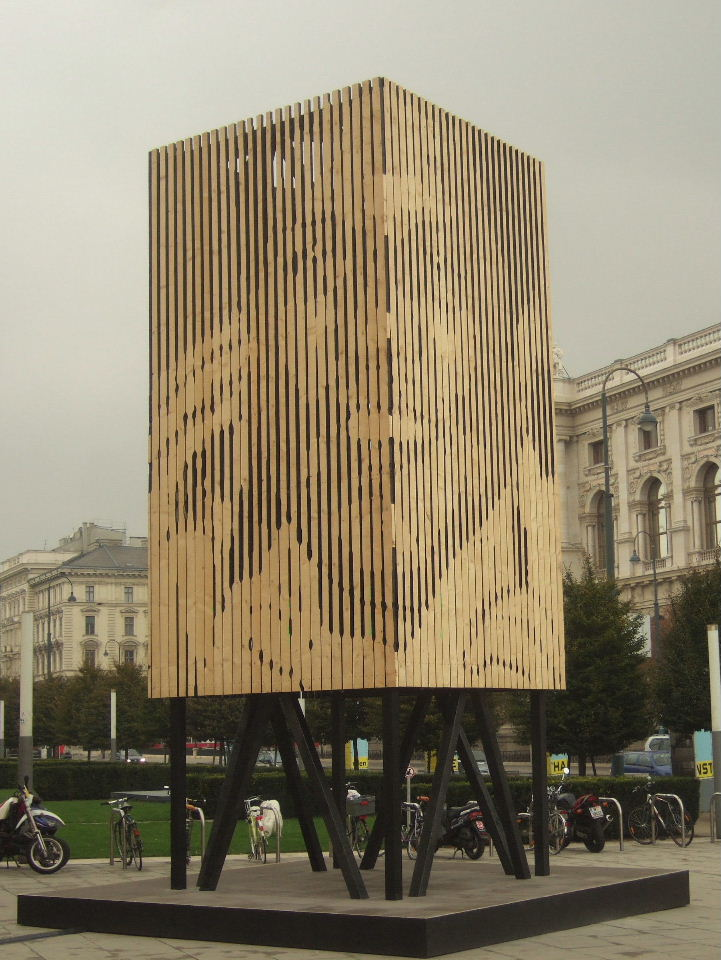 Peter Sandbichler: unbowed and unafraid (2009) - Billboard mit Porträt Lasantha Wickrematunges im Rahmen der MUMOK Skulpturenreihe „OUT SITE“ im Areal des Museumsquartiers in Wien